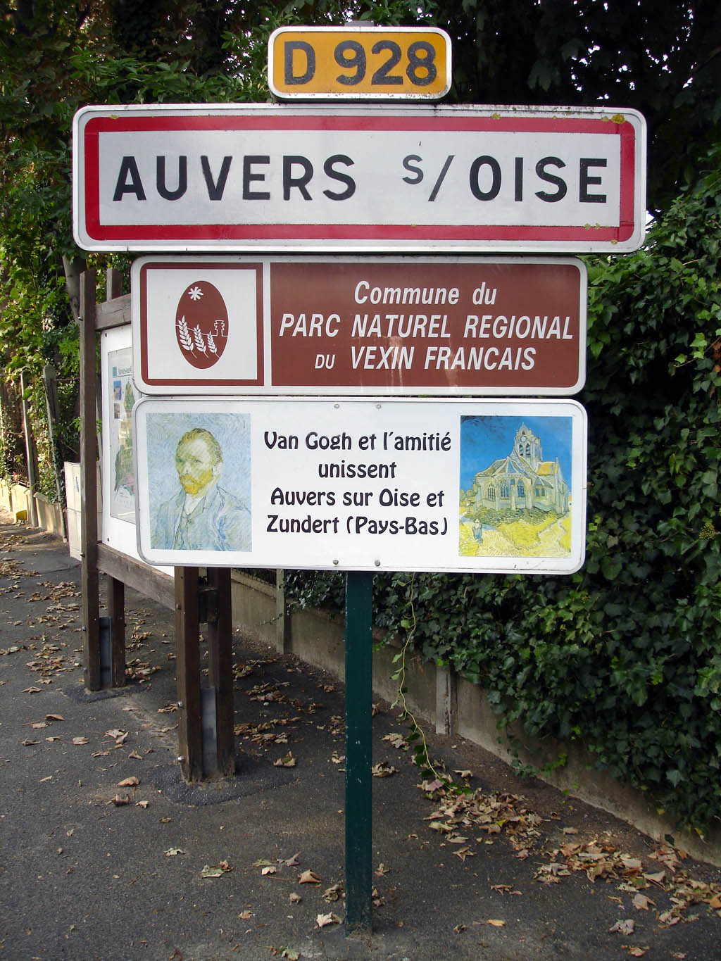 Panneau d'entrée de ville à Auvers-sur-Oise (Val-d'Oise), France